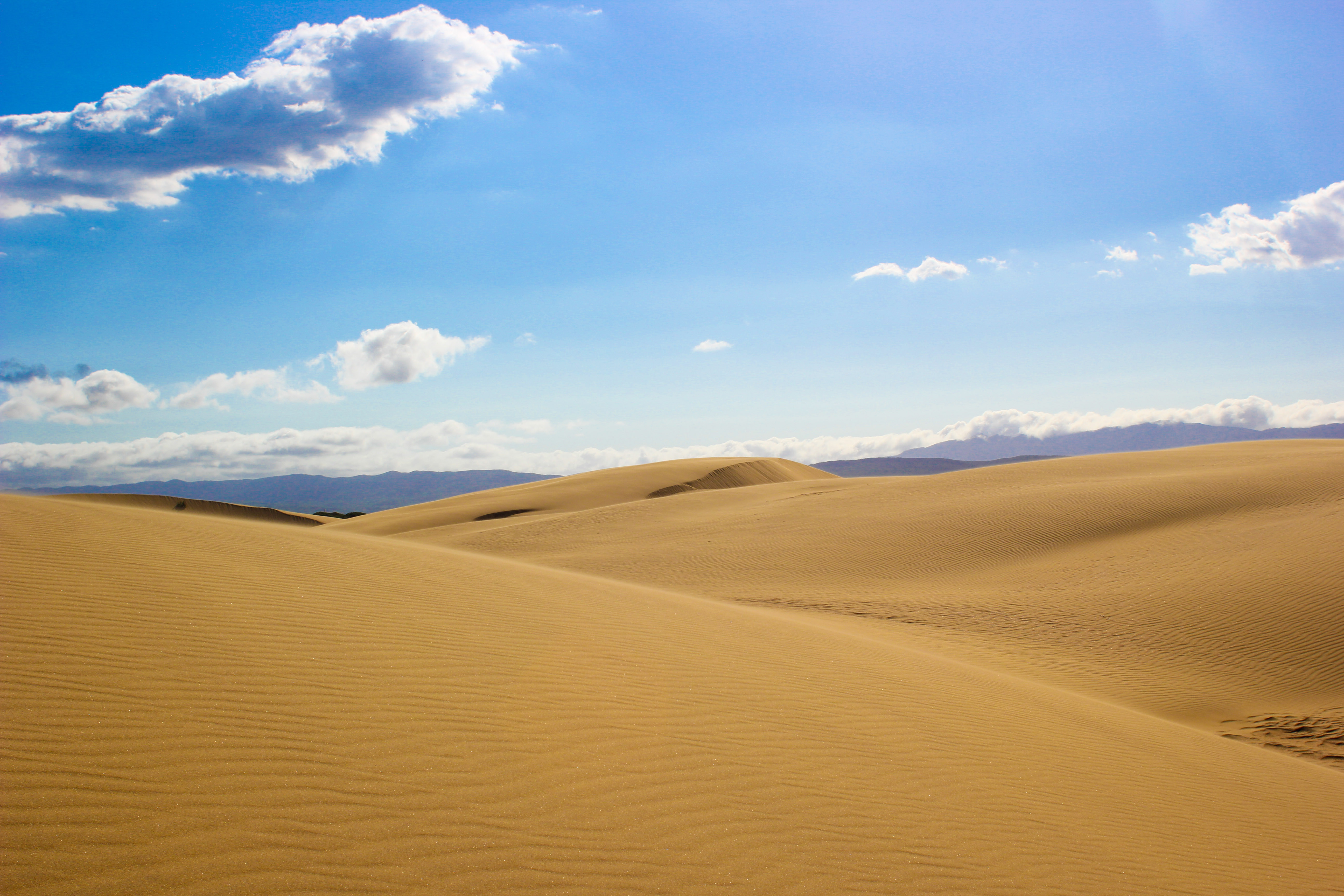 Medanos de Coro, Edo. Falcón